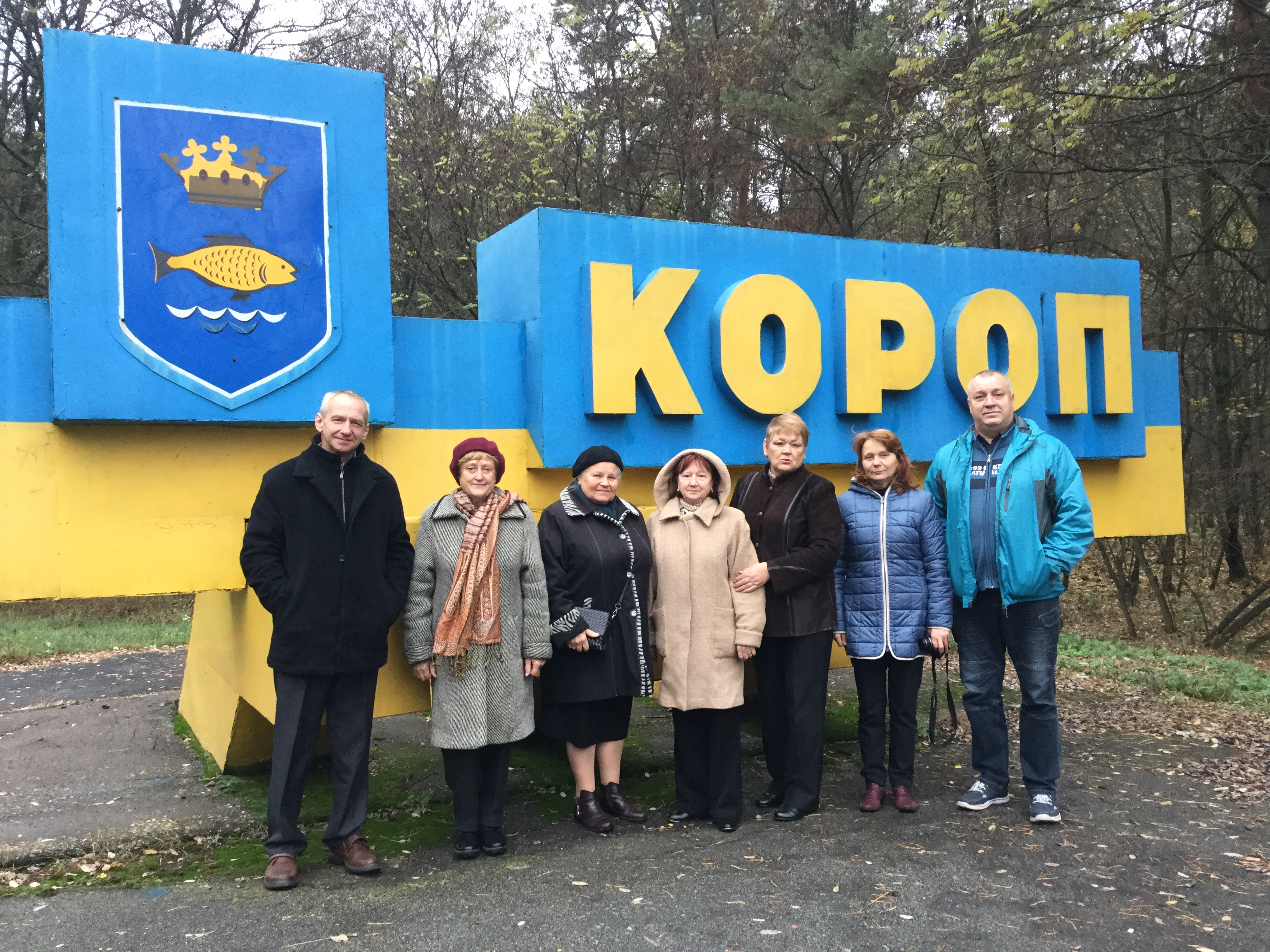 на кордоні